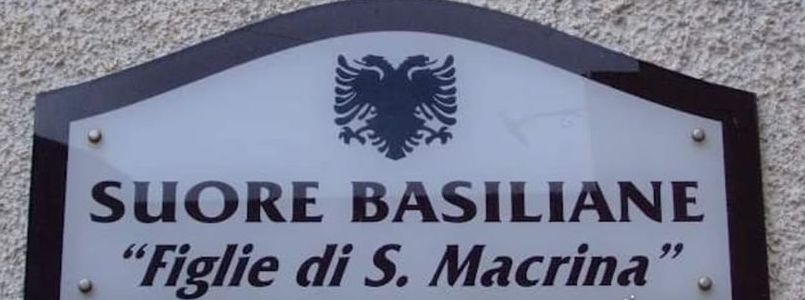 Suore Basiliane Figlie di Santa Macrina, Insegna con lo Stemma dell'ordine, recante l'immagine dell'Aquila bicipite basato sull'emblema di Giorgio Castriota Scanderbeg, nella casa di Palazzo Adriano, Eparchia di Piana degli Albanesi (PA).